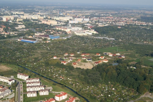 Osiedle Gruszowe Sady